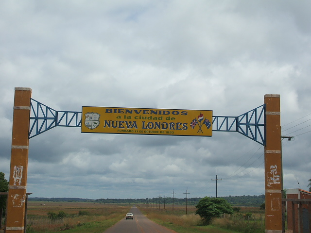 Entrada a Nueva Londres